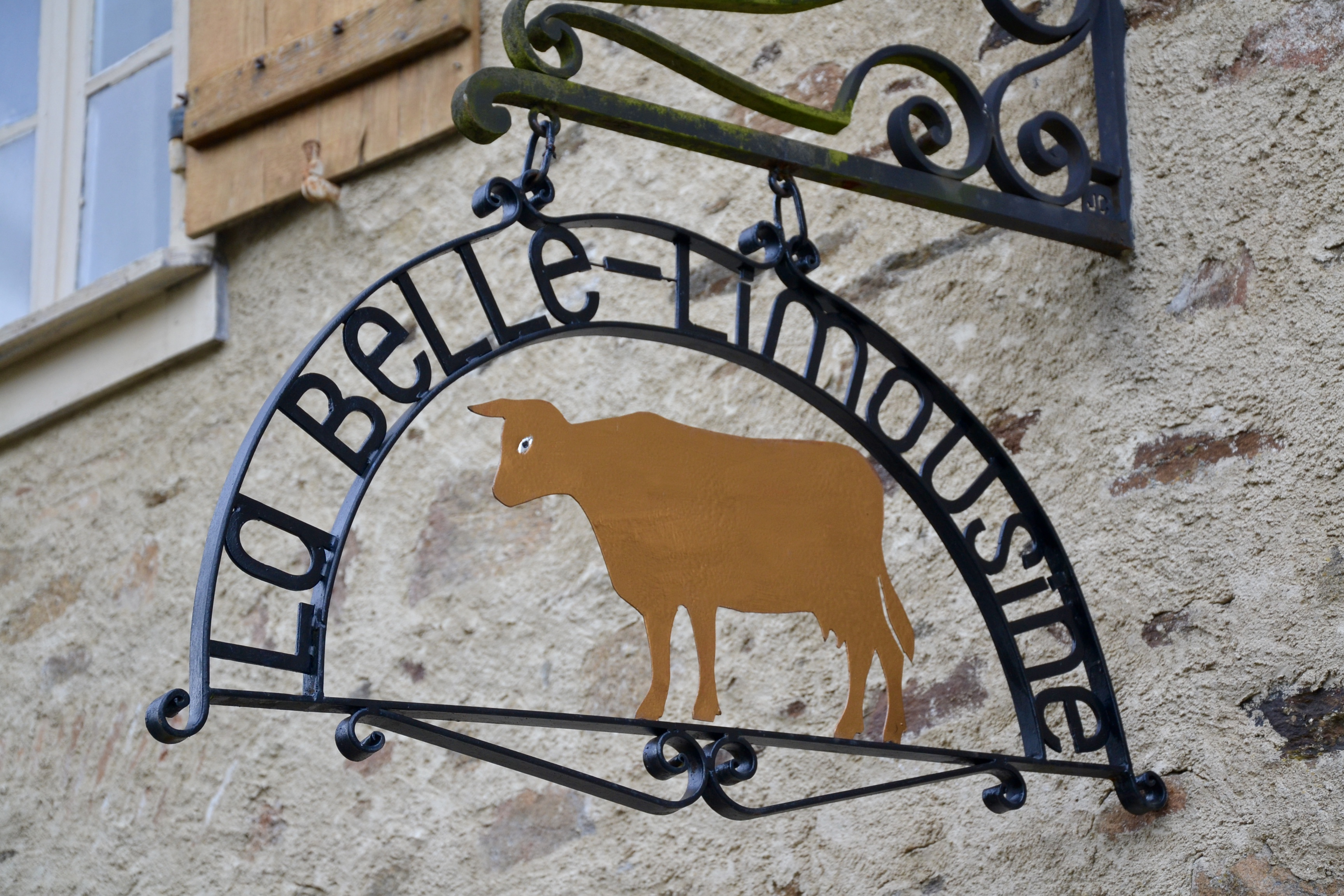 Enseigne à Vicq-sur-Breuilh (Haute-Vienne, France).